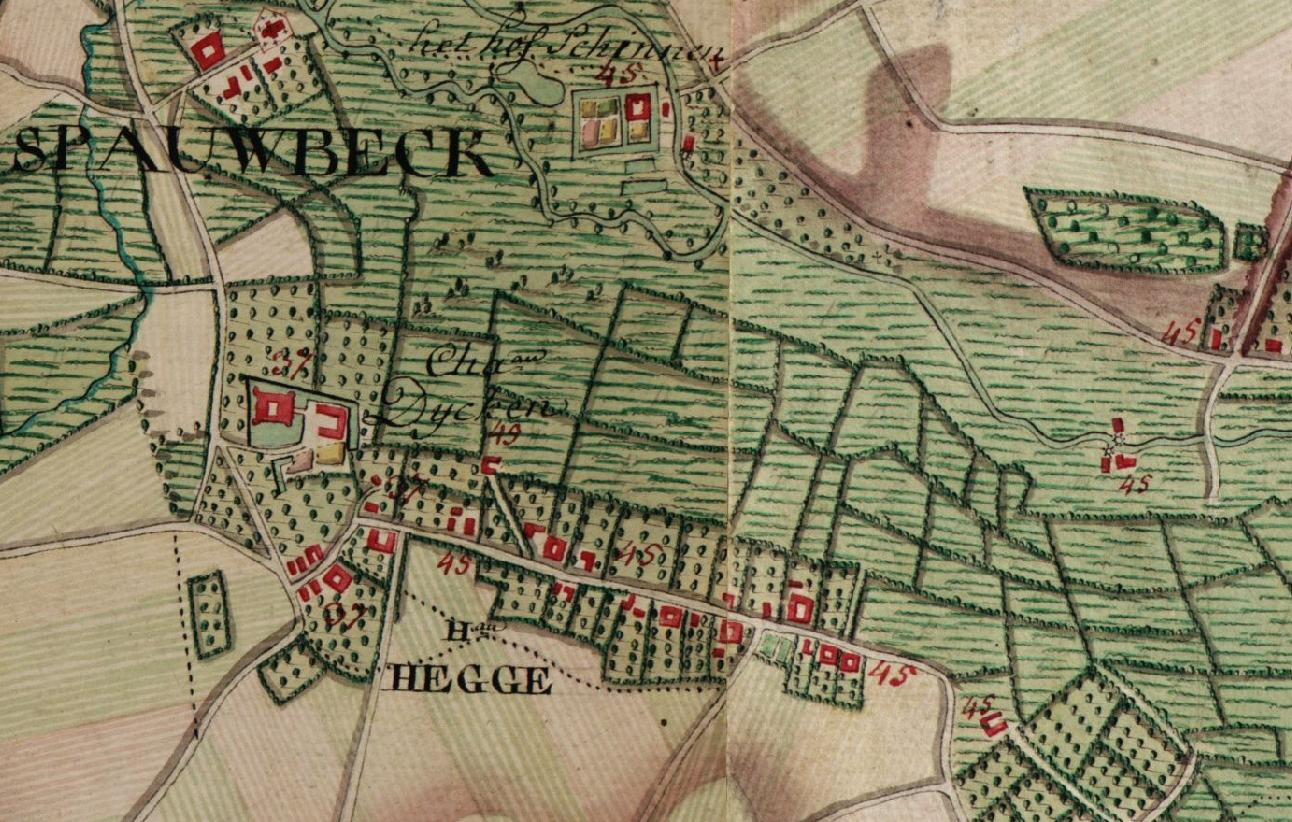 Uittreksel uit de de Ferrariskaart met Hegge bij Schinnen, tonende de mate van detail en de aard der opgenomen gegevens.